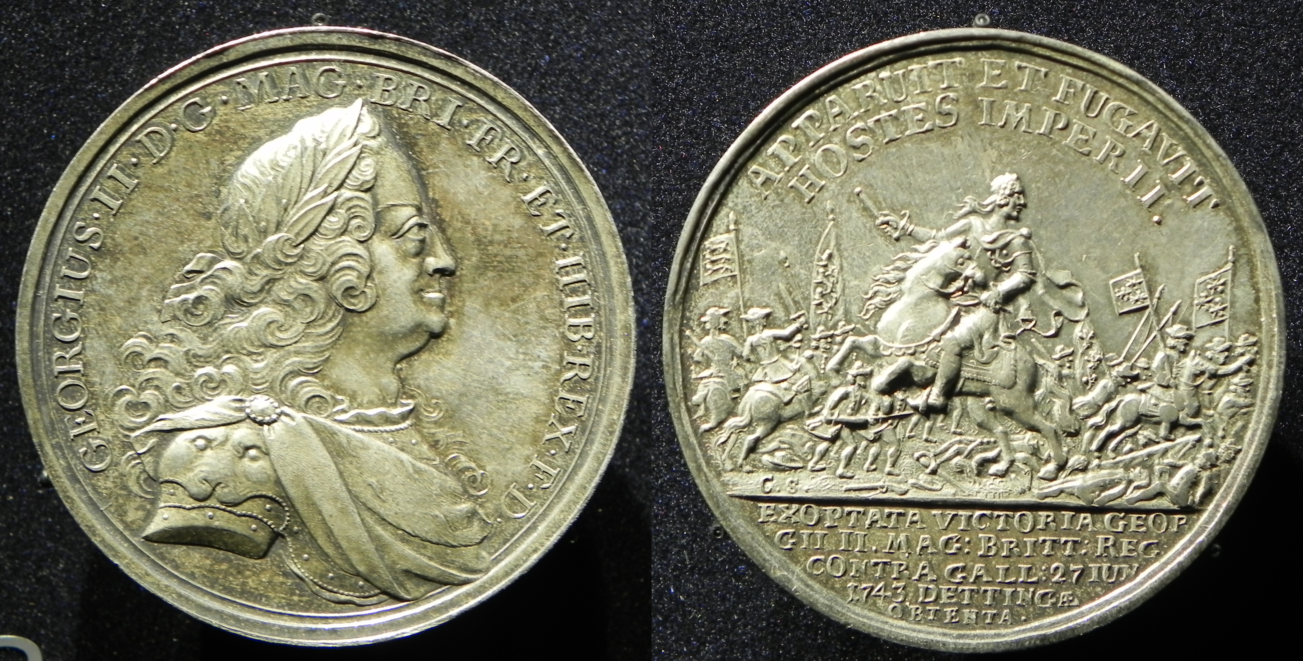 Medaille mit Bild v. König Georg II. von Großbritannien und Irland, anläßlich der Schlacht von Dettingen.